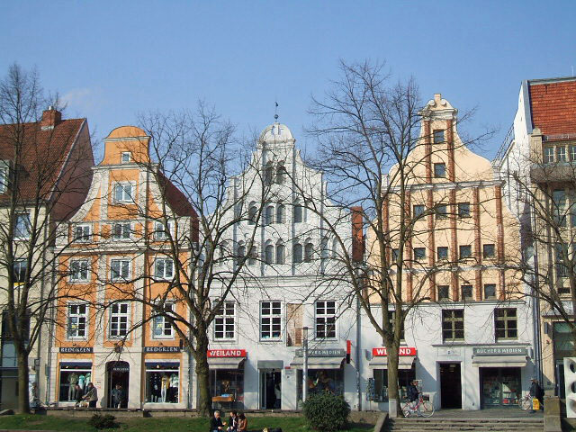 Gebäude bzw. Gebäudedetail in Stralsund. Straße und Hausnummer siehe Dateiname.